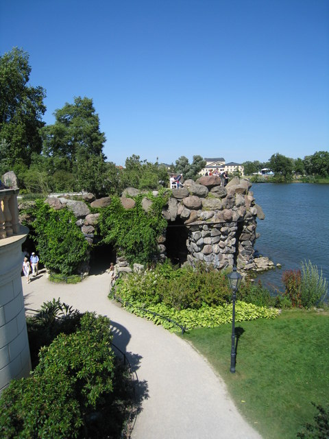 Die Grotte am Schweriner Schloss